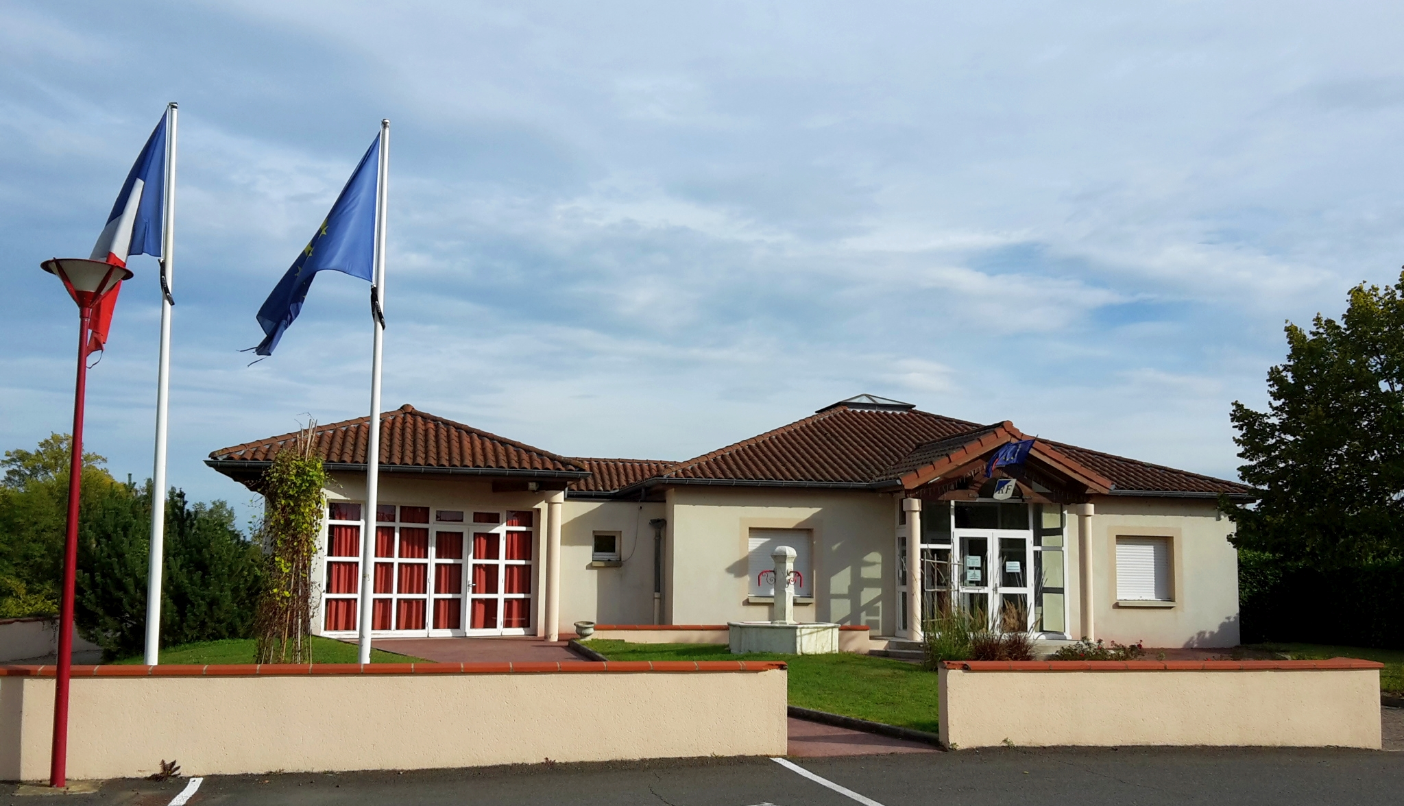 Mairie actuelle de Craintilleux